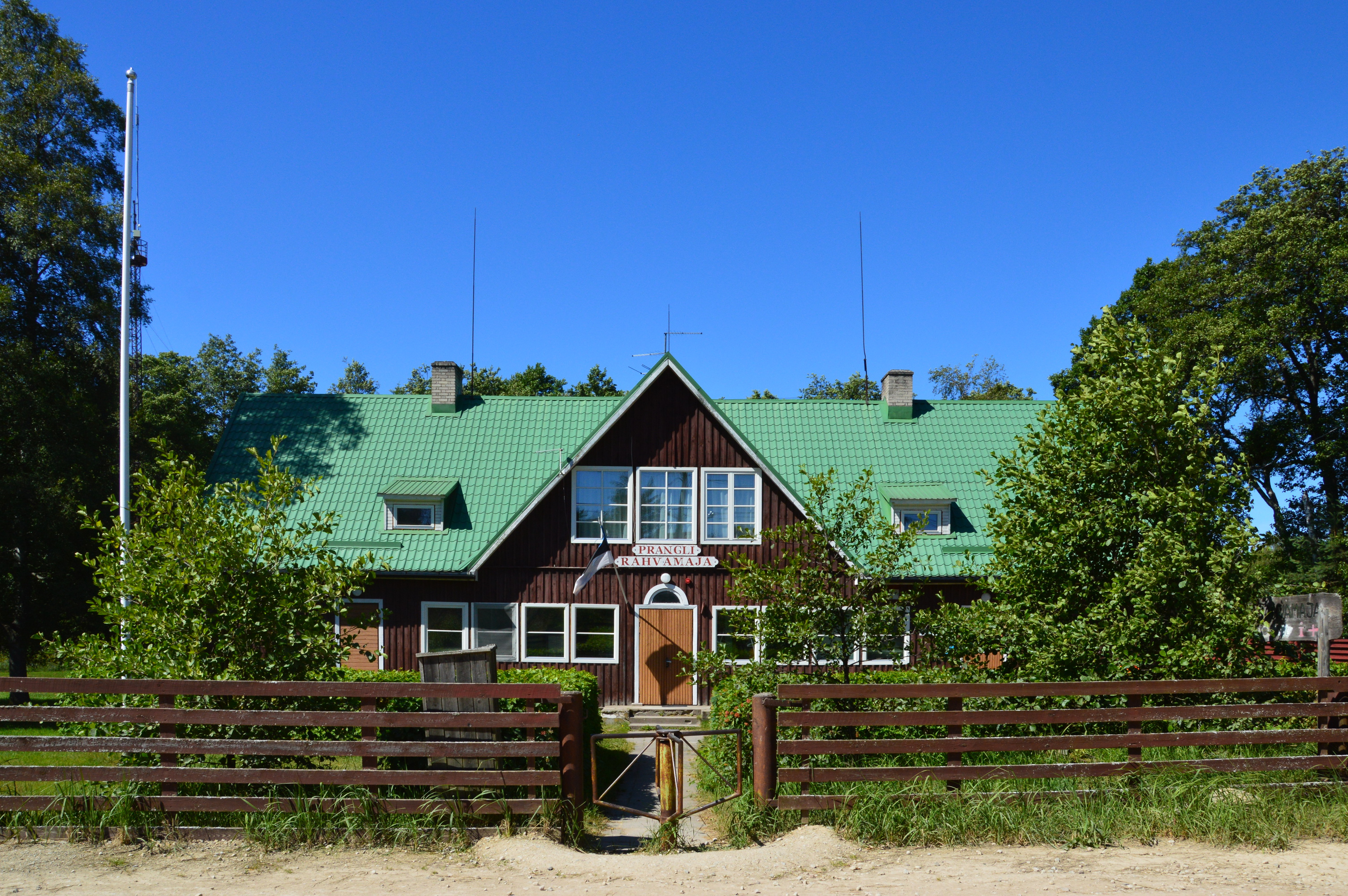 Prangli rahvamaja